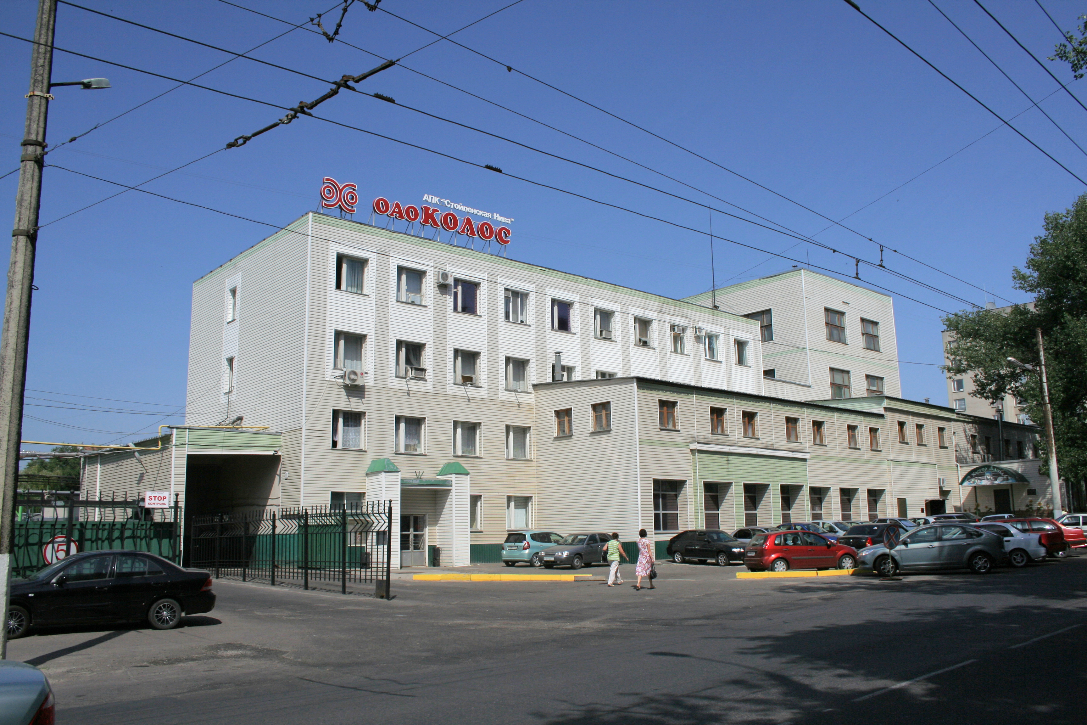 «Колос». Хлебозавод. Город Белгород.